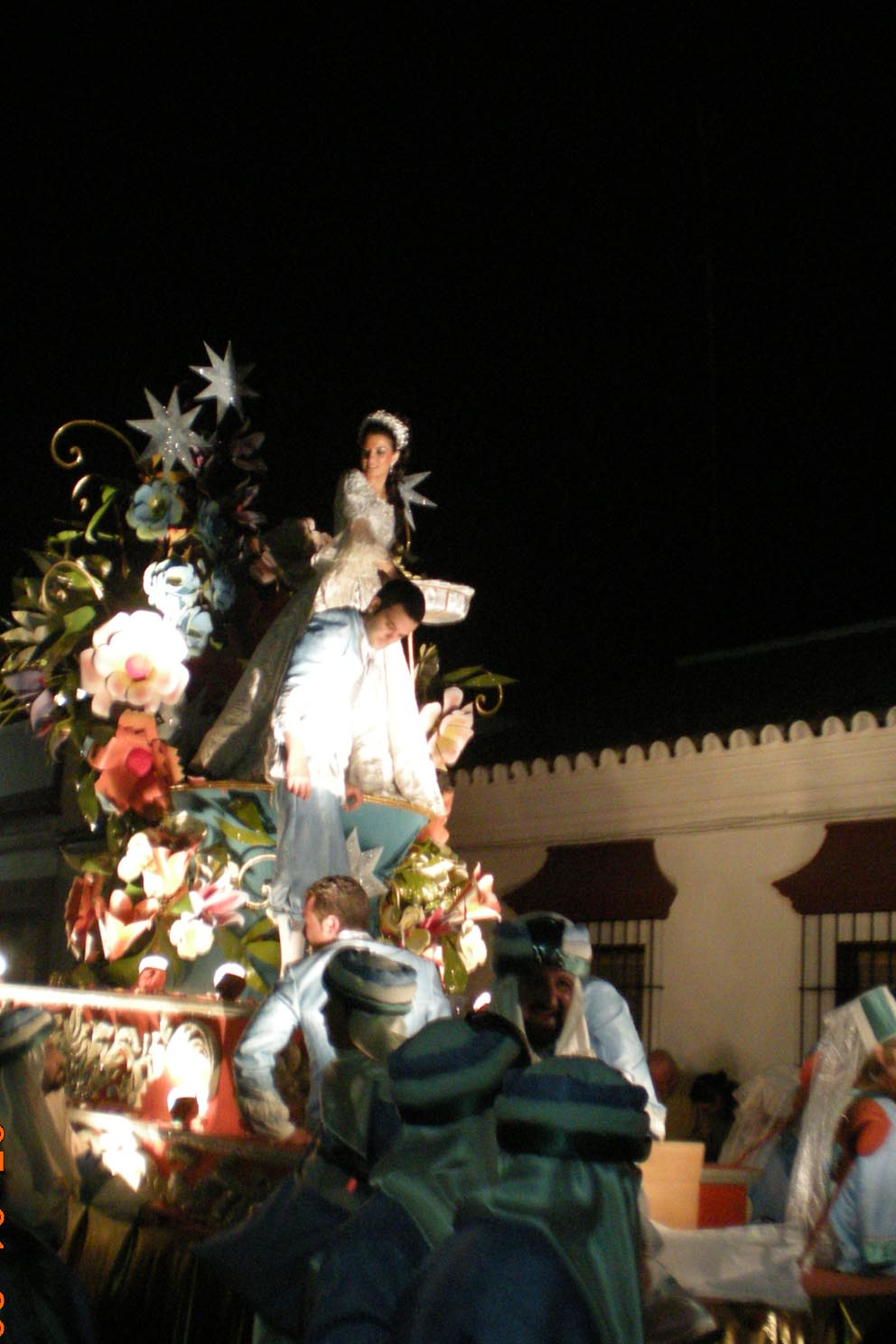 Reyes Magos Carmona 2008